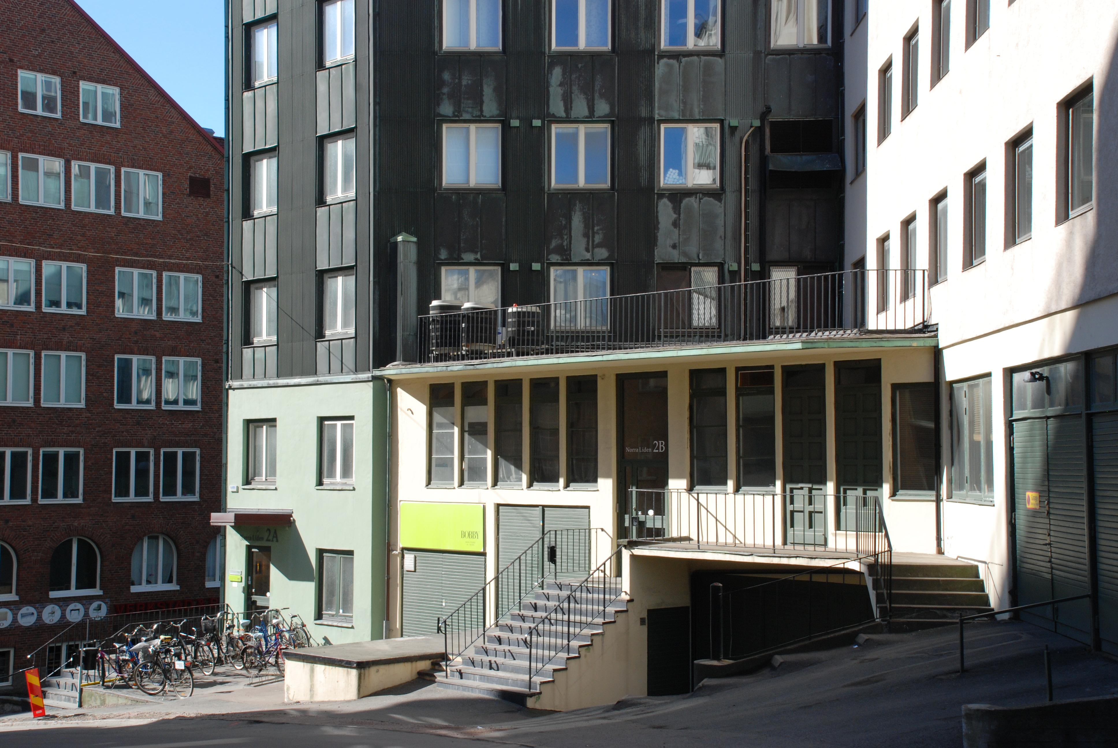 Norra Liden vid Otterhällan i Göteborg.